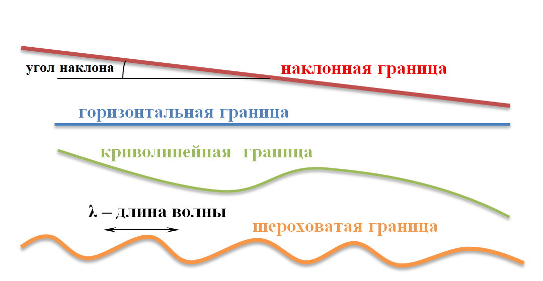 Виды сейсмогеологических границ по форме